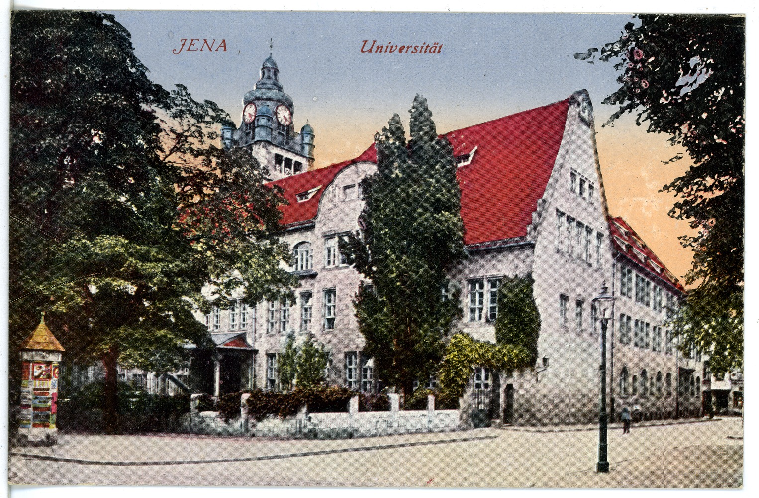 Jena; Universität This postcard is from publisher Brück & Sohn in Meißen ( postcard has a unique number 21242 and is available in a higher resolution at the publisher. This images was uploaded in a cooperation project between Wikipedians and the publisher.